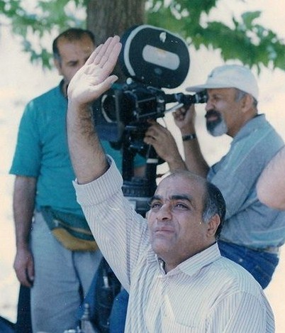 مجید بهشتی در حال کارگردانی فیلم سینمایی مه بانو در سال 1379 در ابیانه کاشان